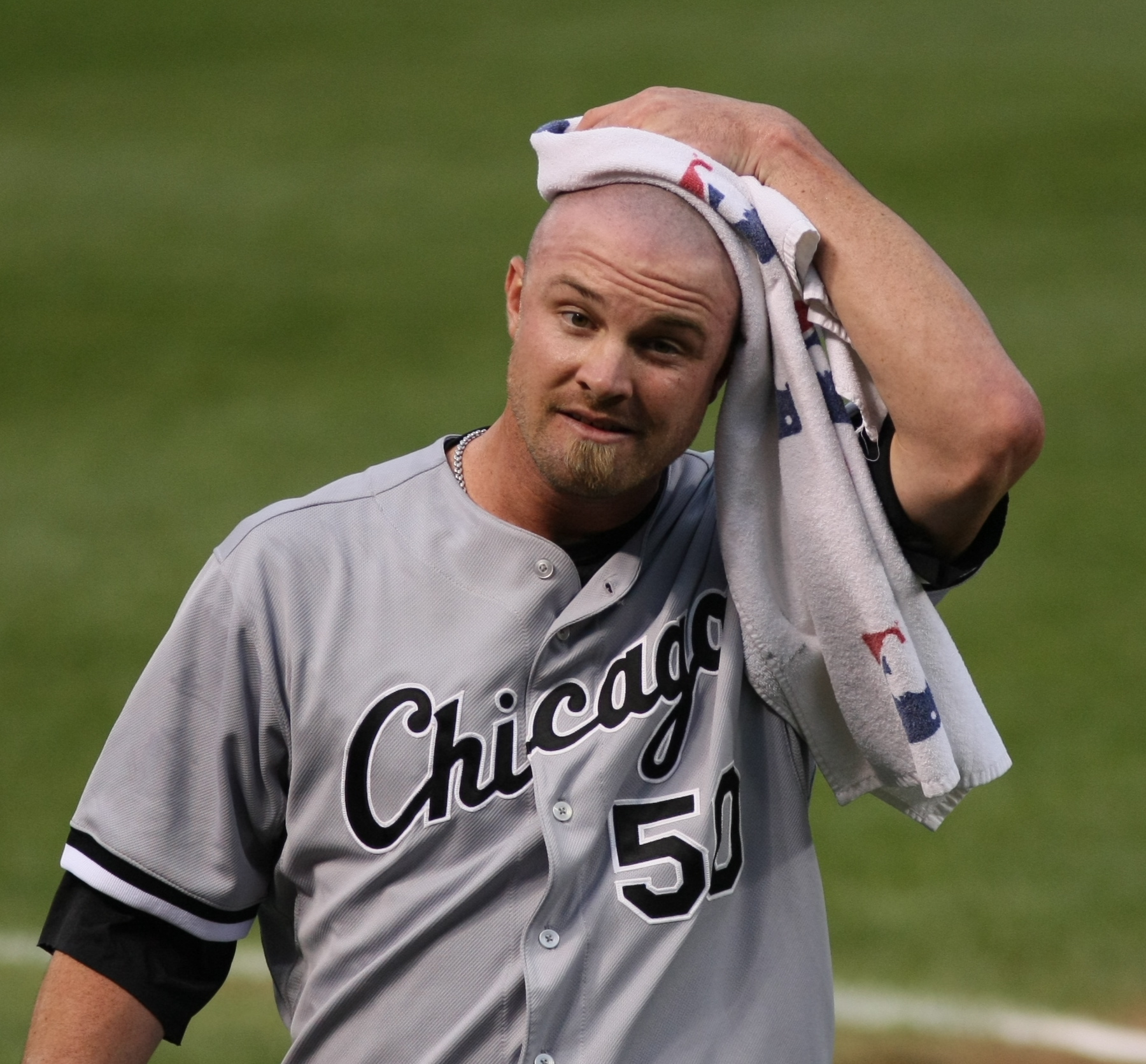 John Danks